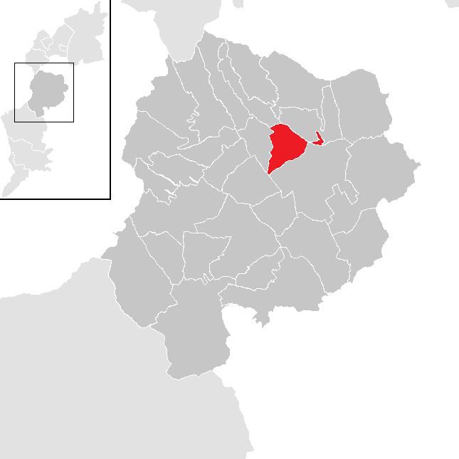 Bezirk Oberpullendorf